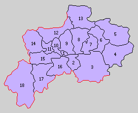 兵庫県多紀郡の町村制時点の町村。